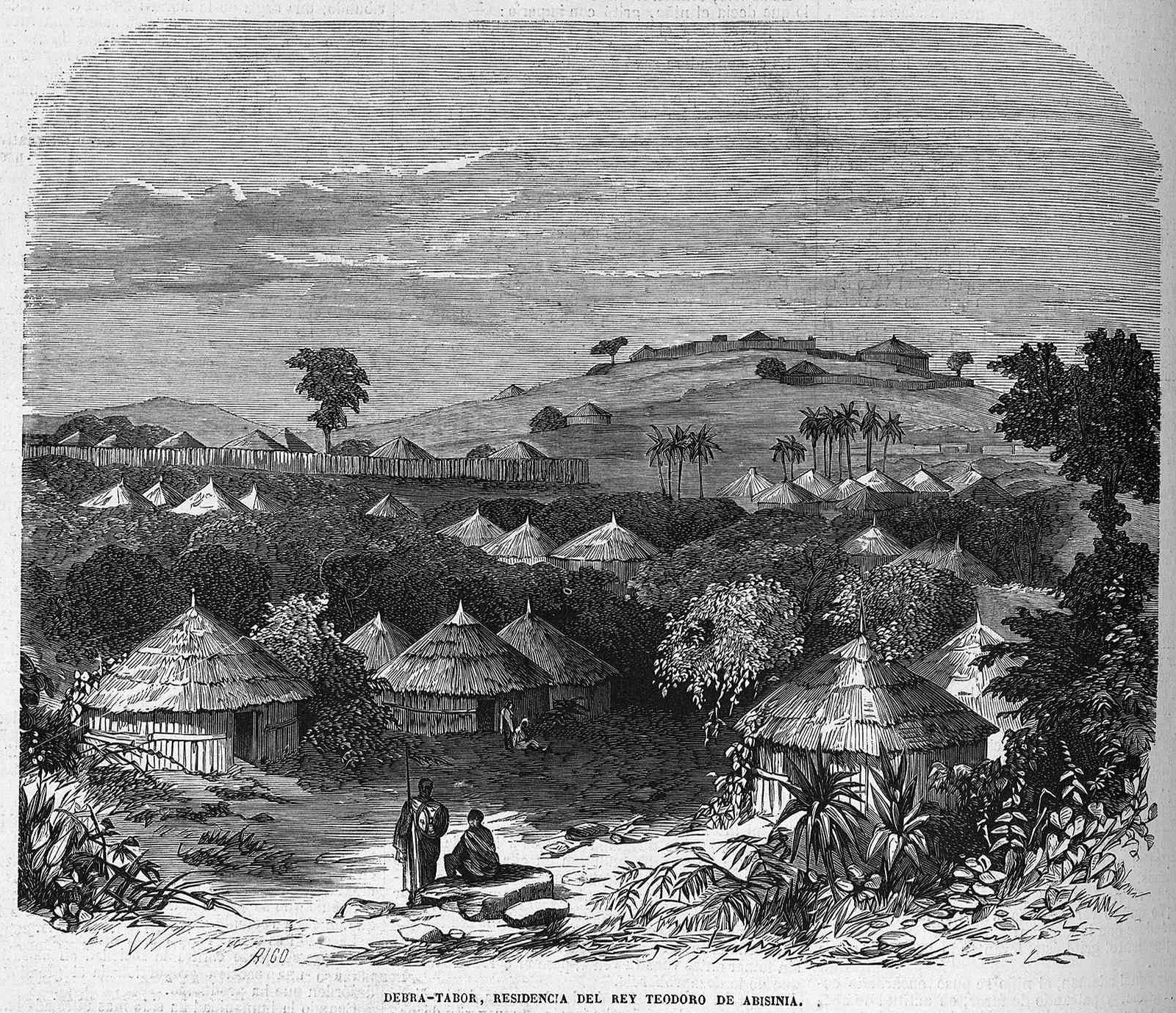 Debra-Tabor, residencia del rey Teodoro de Abisinia, en la revista española El Museo Universal.